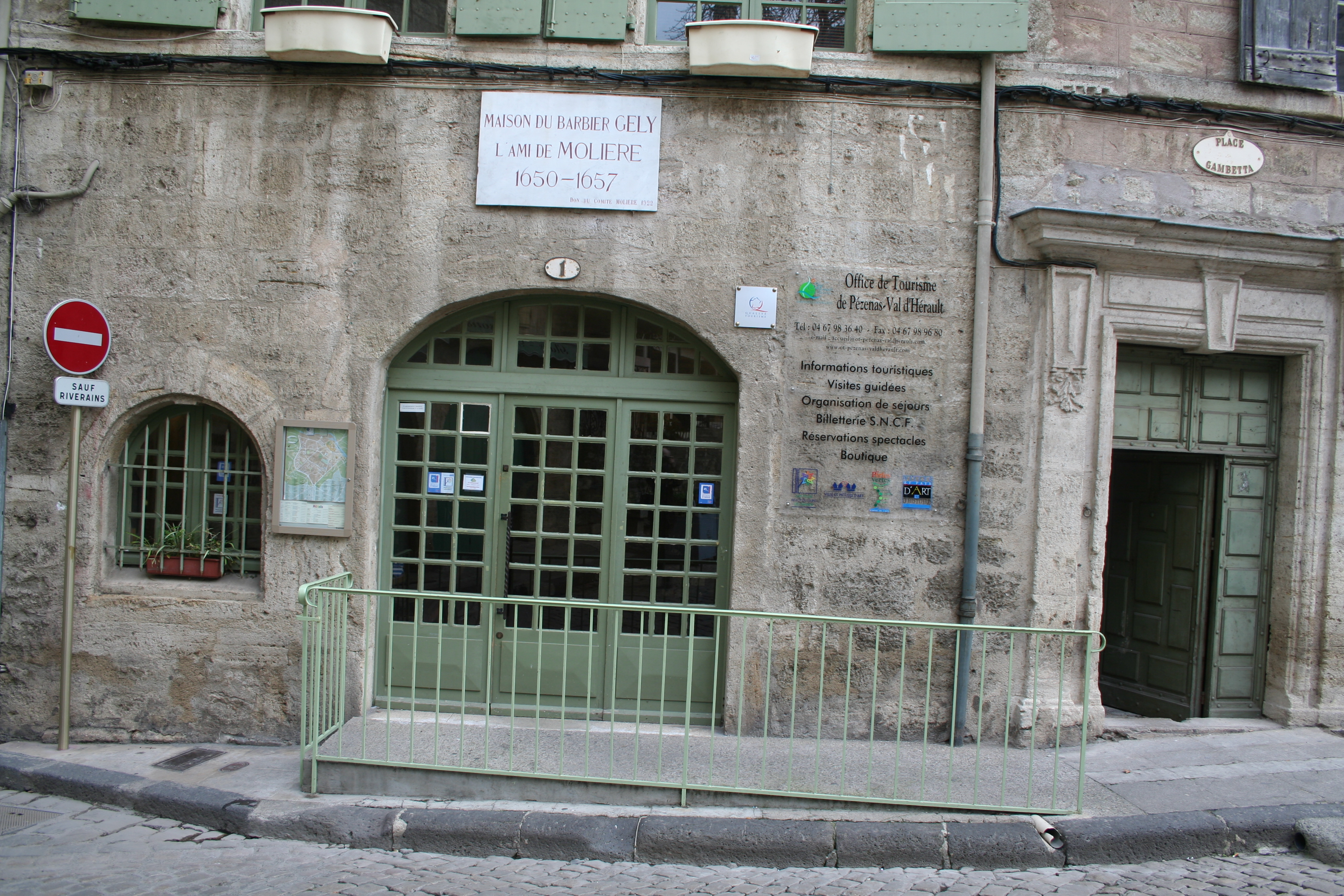 Pézenas (Hérault) - boutique du barbier Gely, l'ami de Molière.